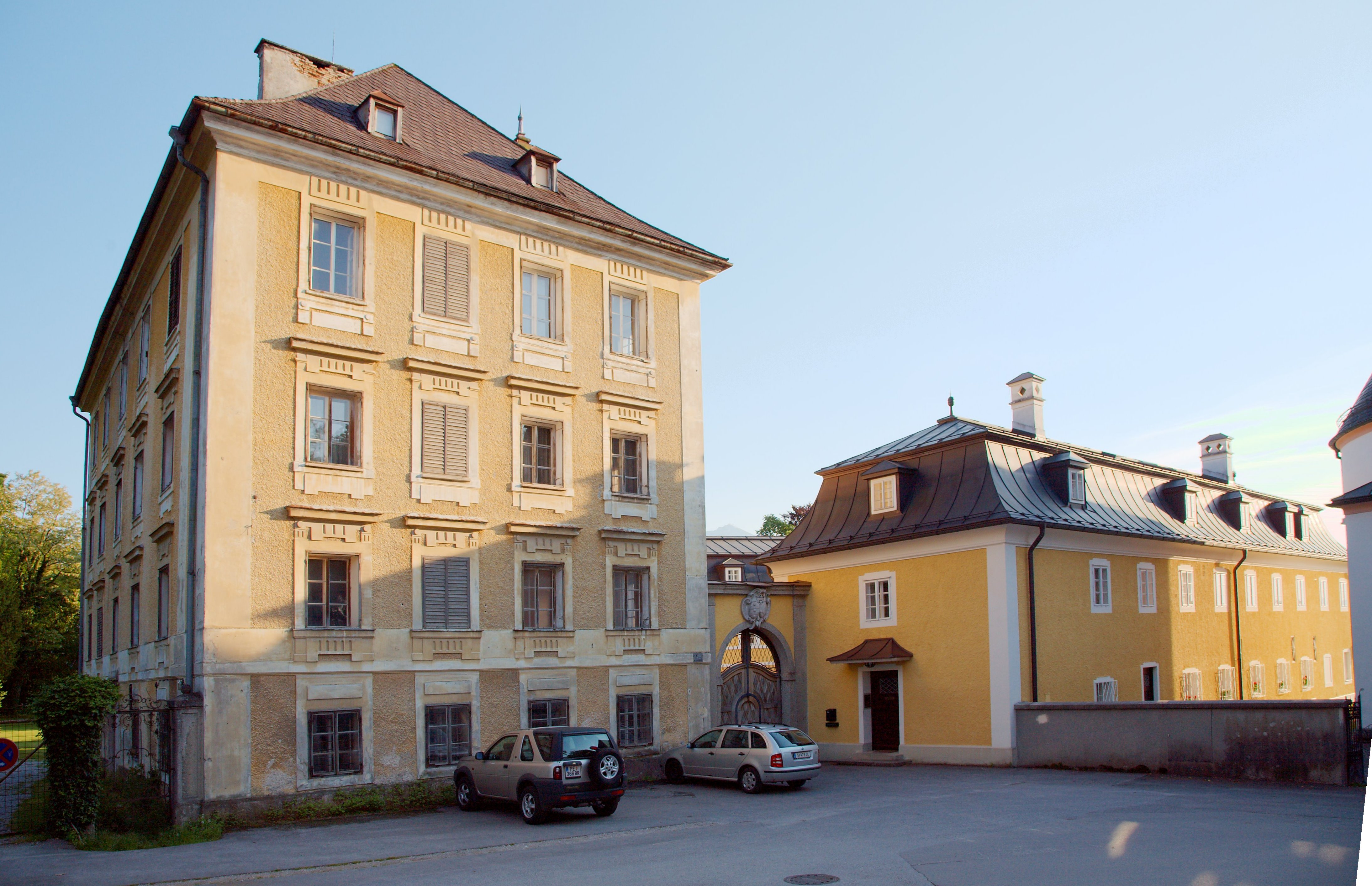 Schloss Aigen in Salzburg